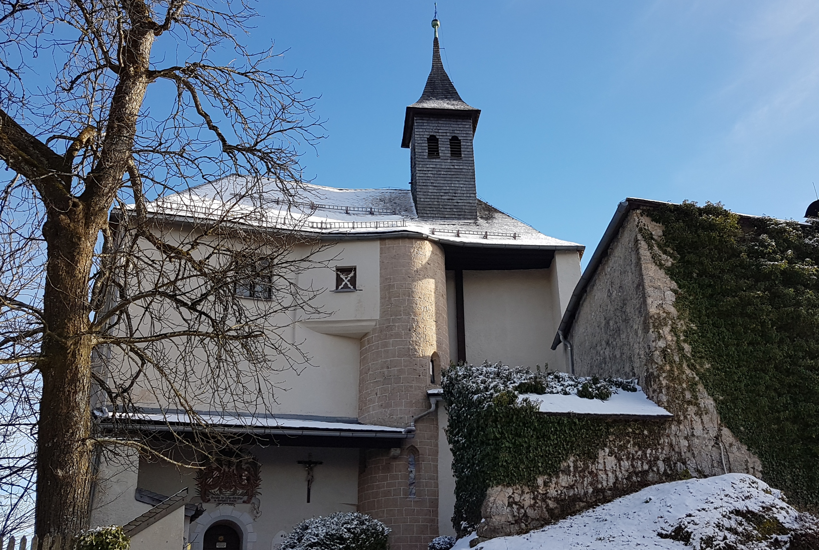 Kufstein-Thierberg, Thierbergkapelle (Teil der ehemaligen Burganlage)